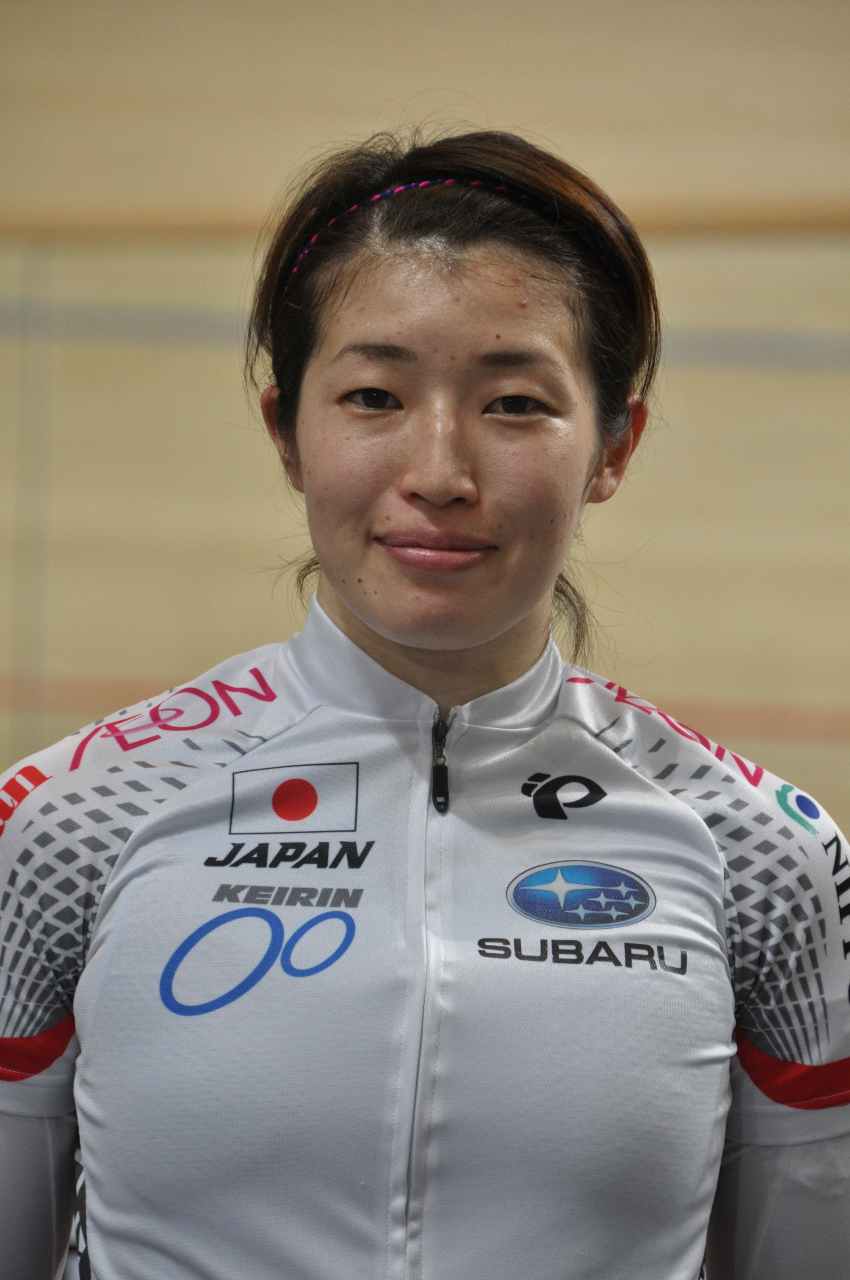 Takako Ishii, Radsportlerin aus Japan